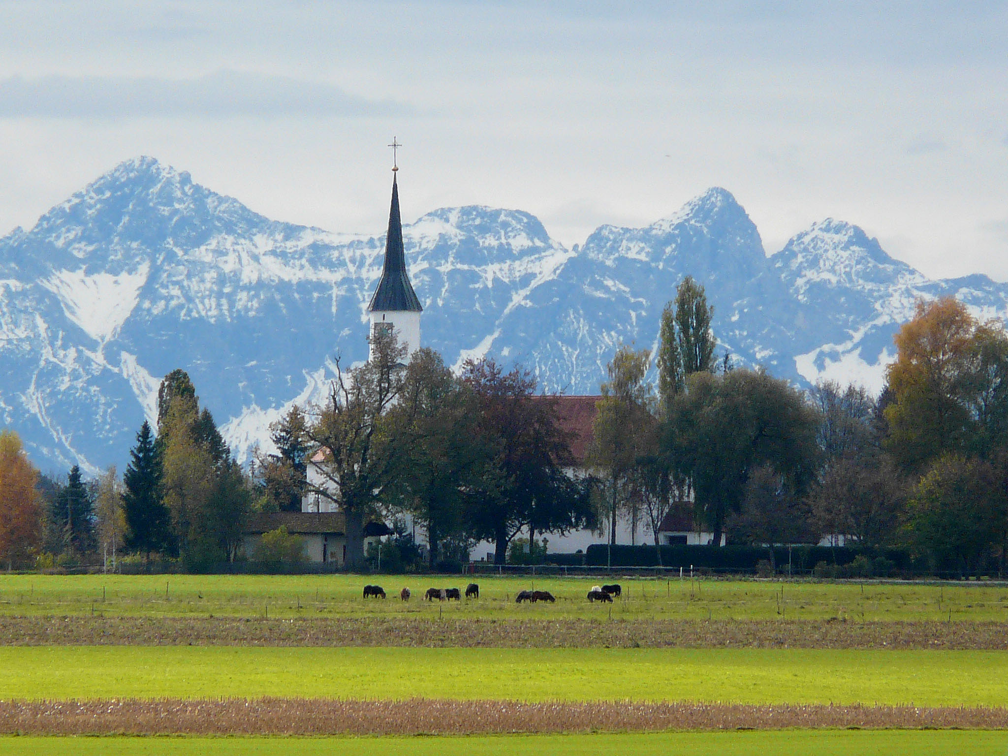 Kirche in in Westendorf (Ostallgäu)